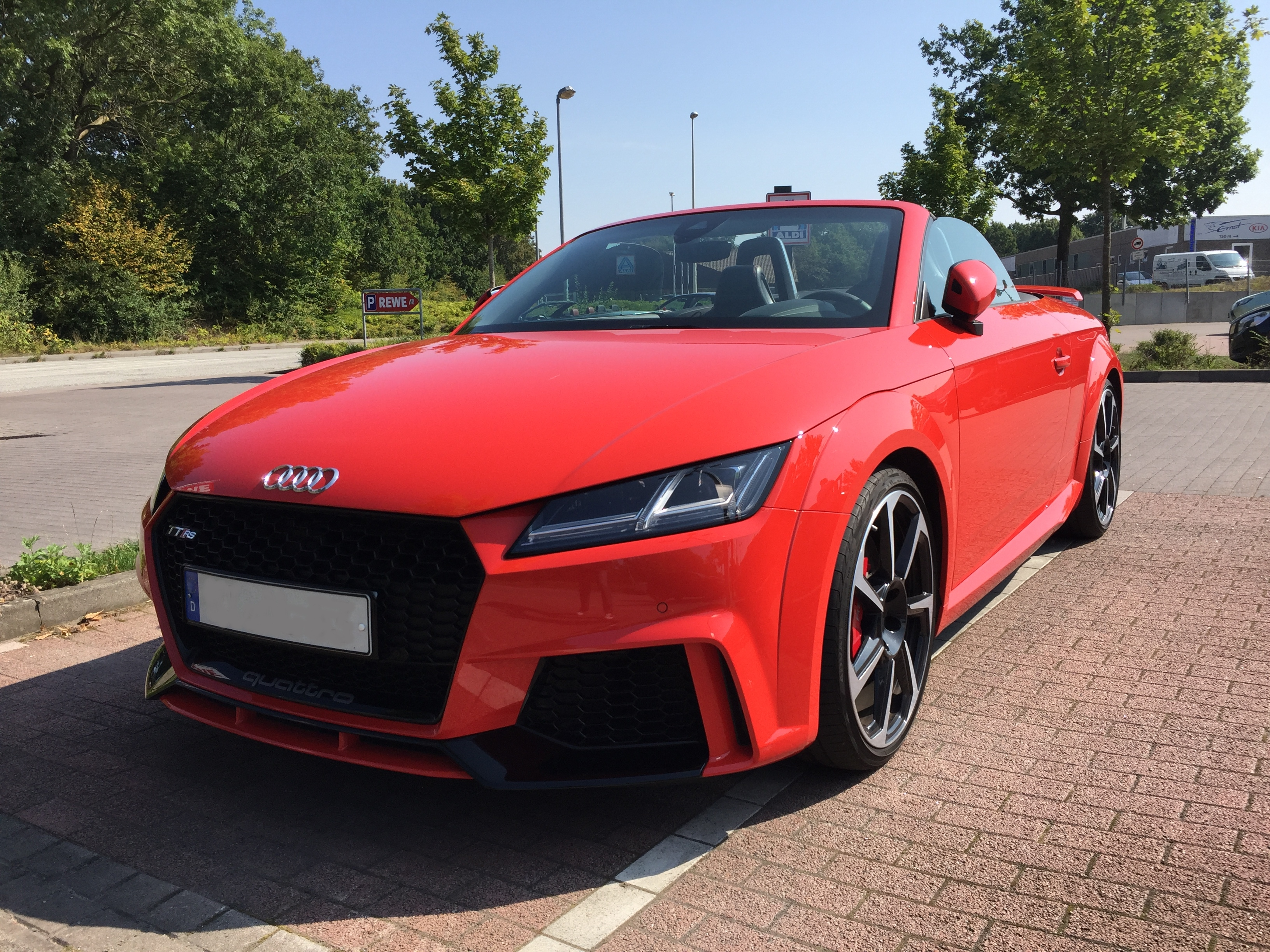 Audi TT RS Roadster